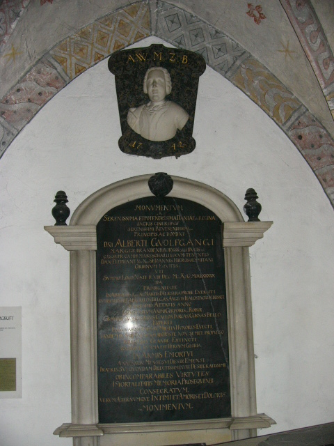 Denkmal für Albrecht Wolfgang von Brandenburg-Bayreuth im Kloster Himmelkron